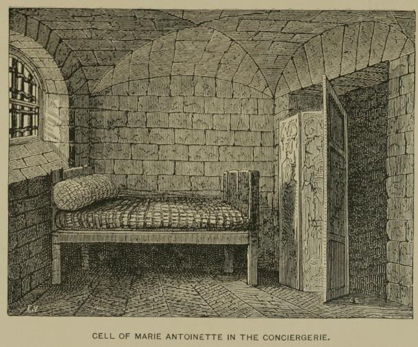 Cellule de Marie-Antoinette a la Conciergerie